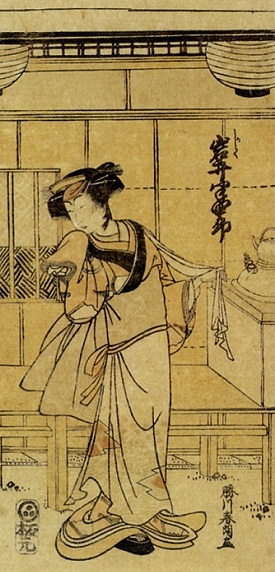 L'attore Iwai Hanshiro nel ruolo di Kashiku, nell'opera kabuki Katakiuchi Adana Kashiki.